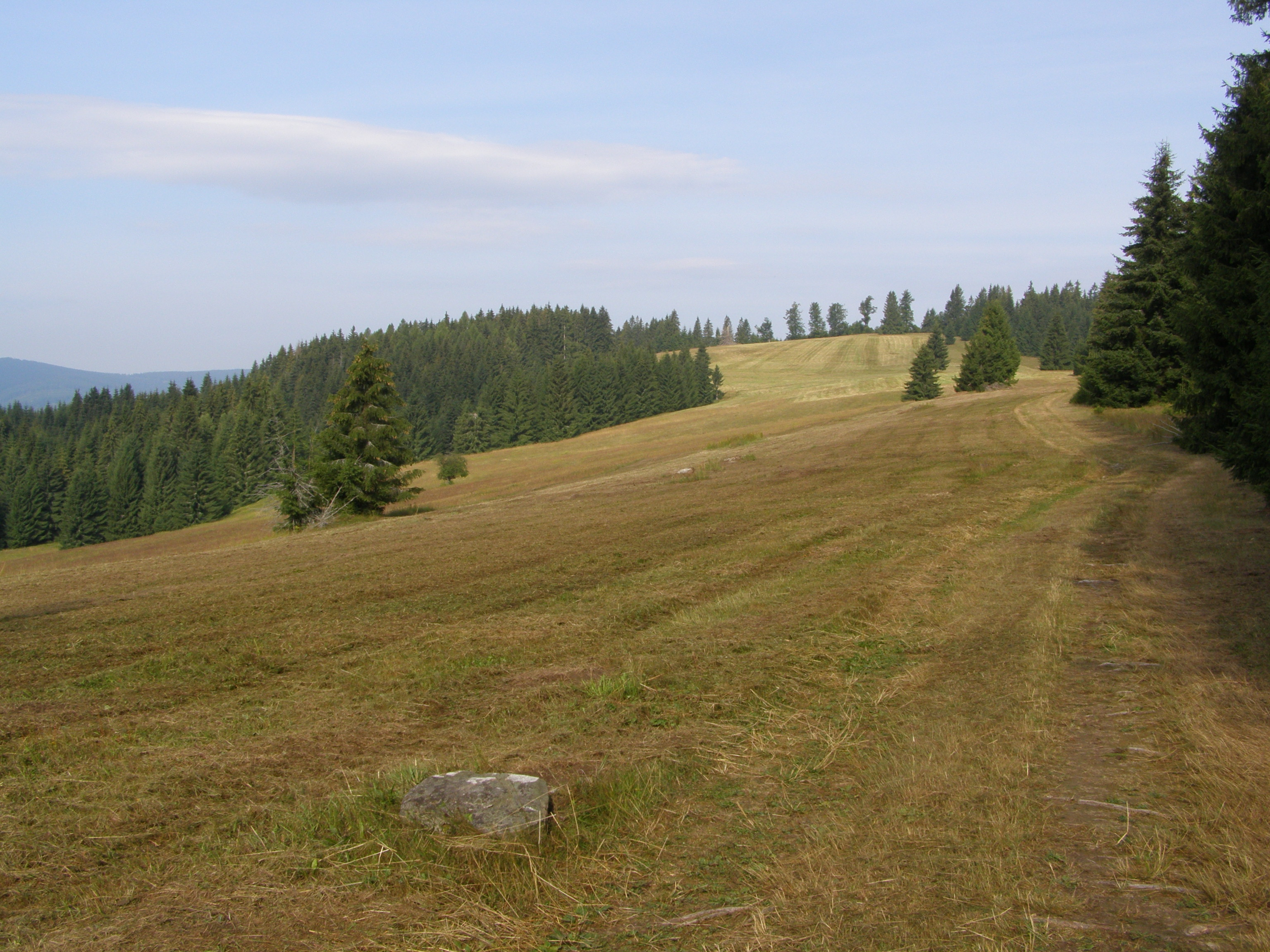 Slovenské rudohoří, Veporské vrchy, Balocké vrchy, pohledna vrchol Obrubovanec (1020 m) z východního úbočí